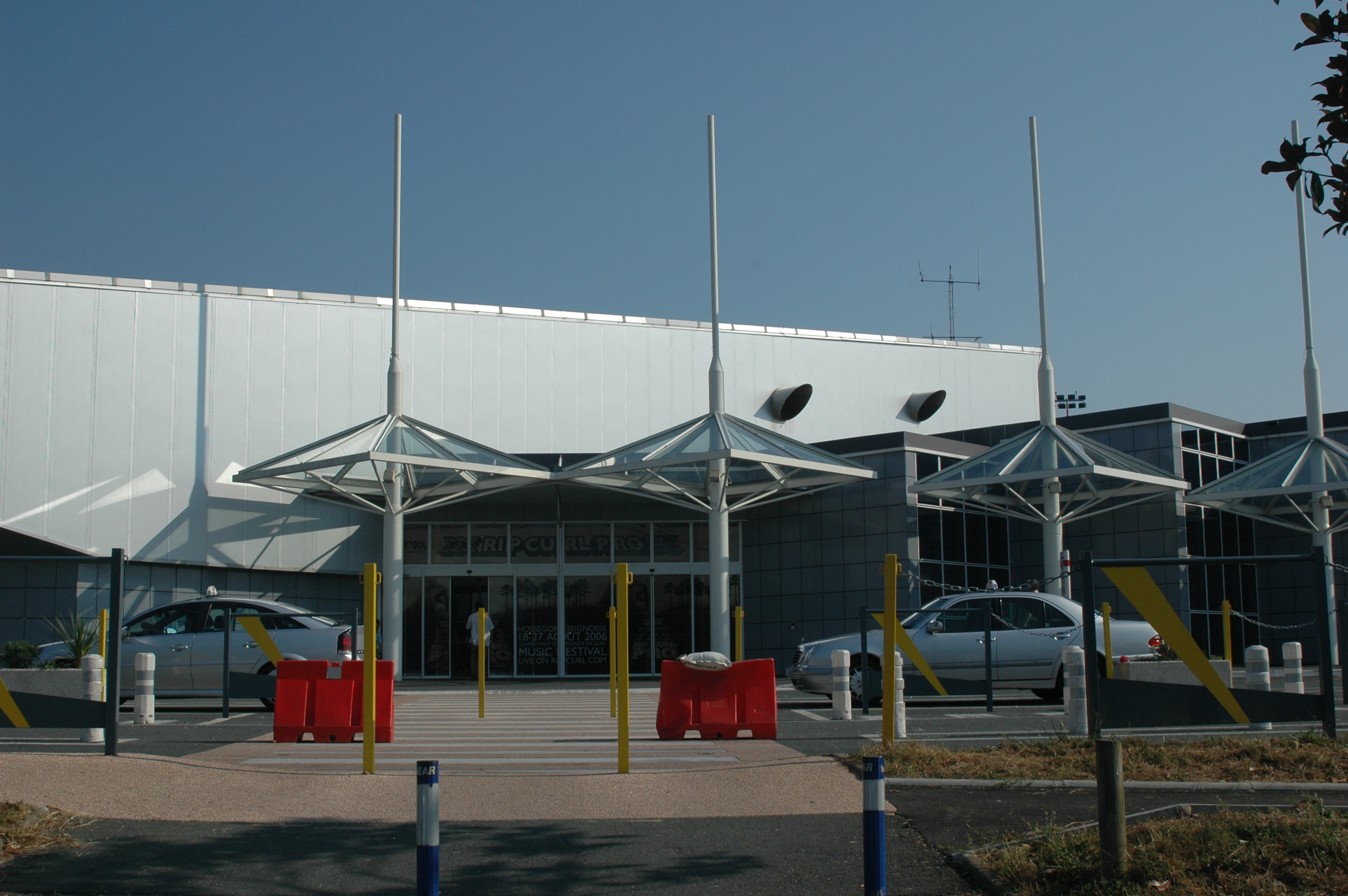 Aéroport de Biarritz. Photo prise le 17/07/06 par Harrieta171